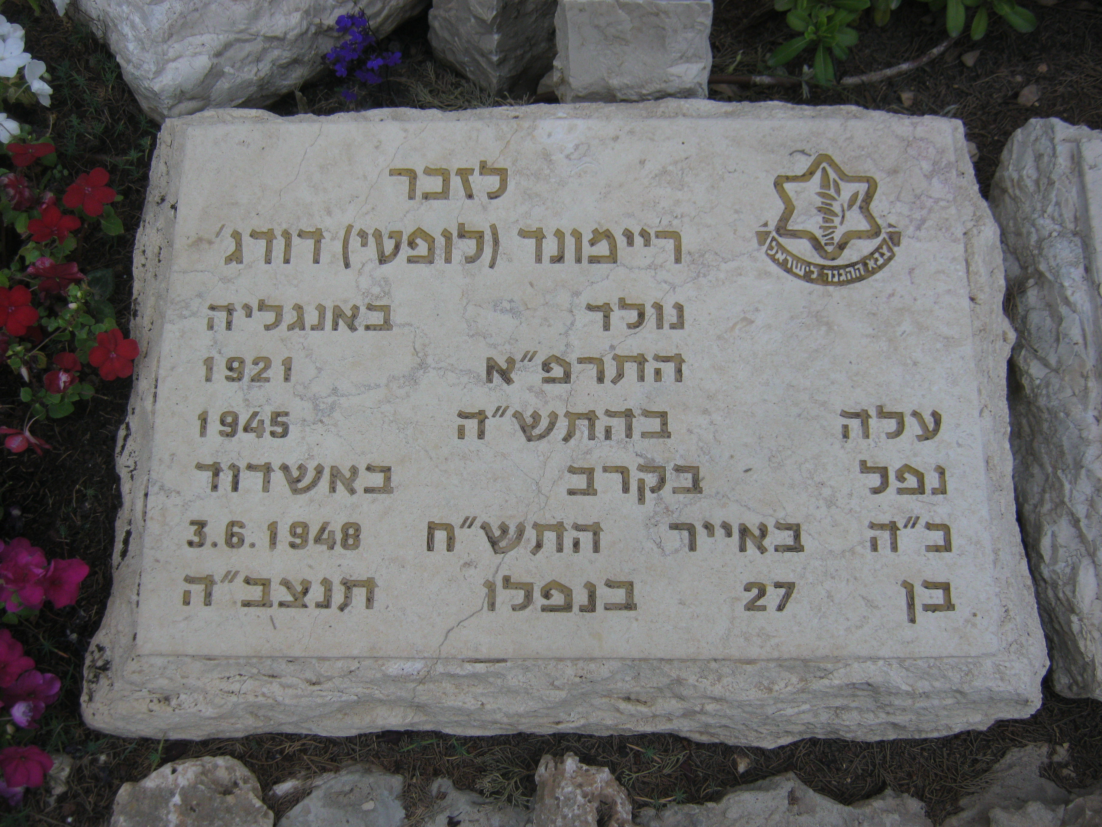 מצבה לזכר ריימונד דודג' בגן הנעדרים בבית הקברות הצבאי בהר הרצל. דודג' היה חייל בריטי שערק לשורות צה"ל, שירת בחטיבת הנגב ונעלם בחזית הדרום